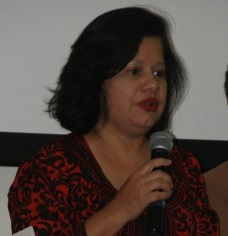 Martha Cecilia Ruiz durante el lanzamiento de la publicación "99 palabras de mujer", en el Centro Cultural de España en Nicaragua, el 8 de marzo de 2016.